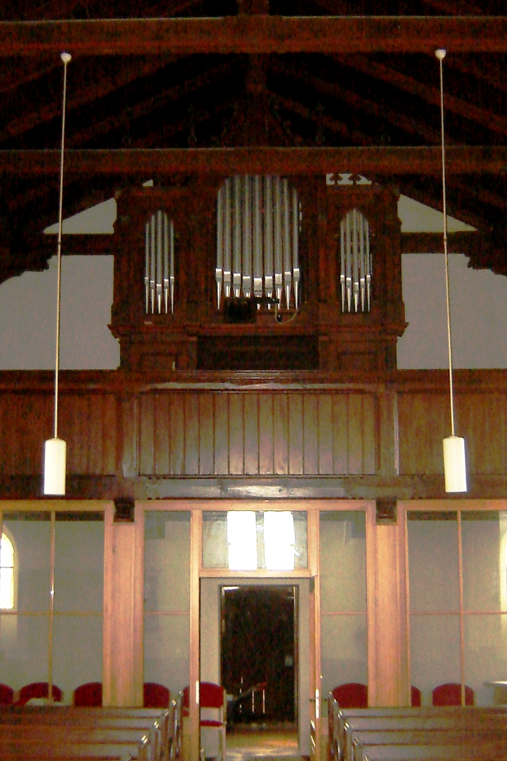 St.-Stephan-Kirche in Bördeland-Zens, Orgel